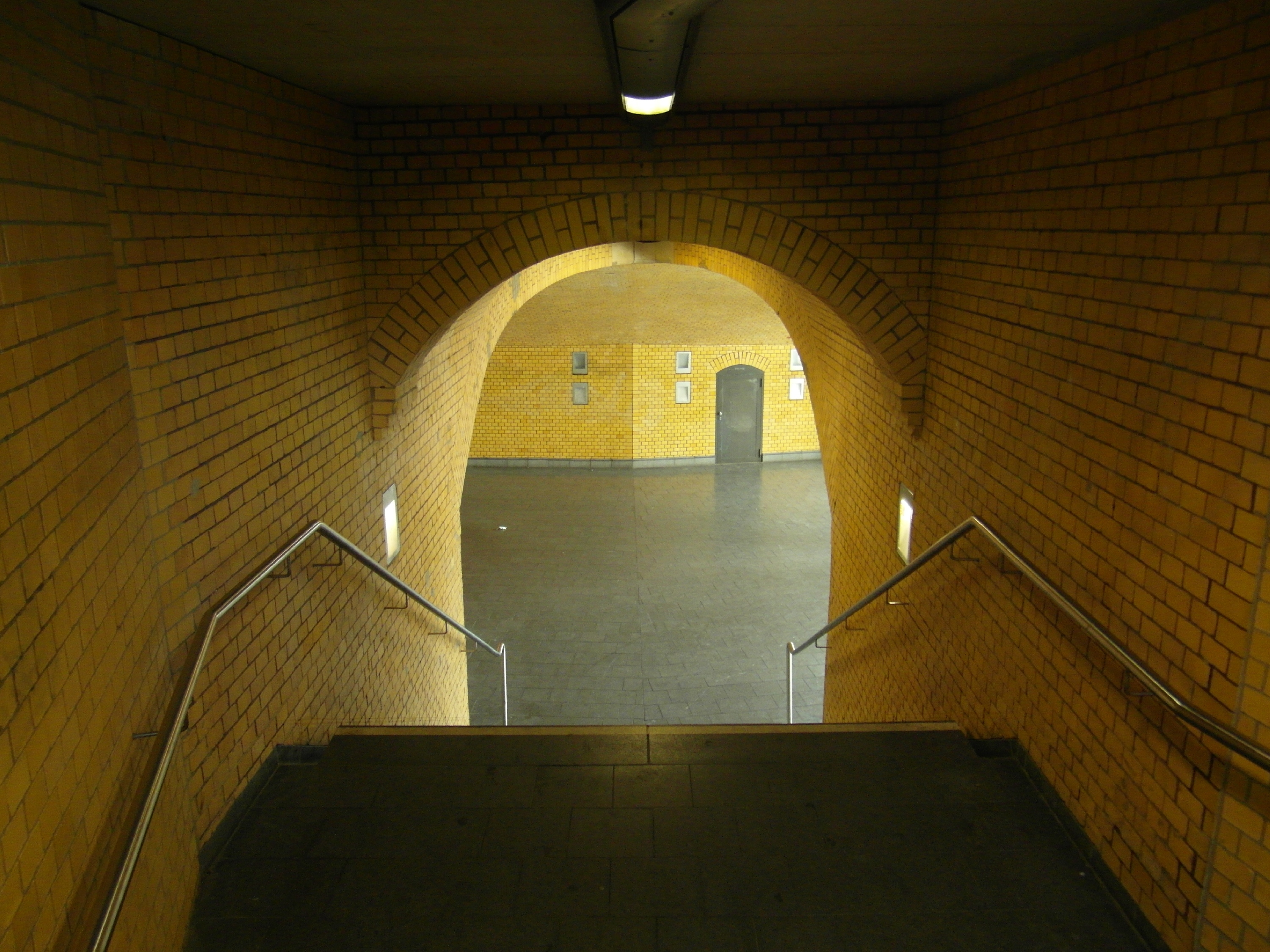 Berlin - S-Bahnhof Wedding - Ringbahn - Linien S41, S42